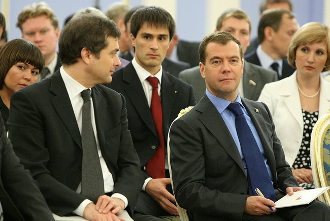 Vladislav Surkov,Гаттаров, Руслан Усманович, Dmitry Medvedev